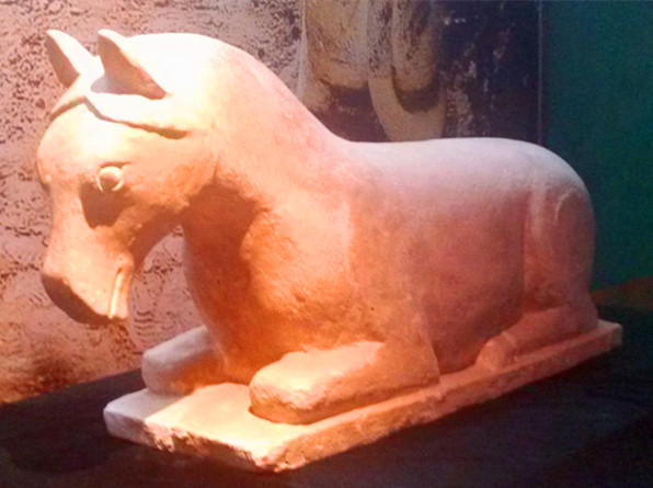 石马，1977年宁夏银川西夏陵区M177出土，长130cm、宽38cm、高70cm、重355kg，现藏于宁夏博物馆